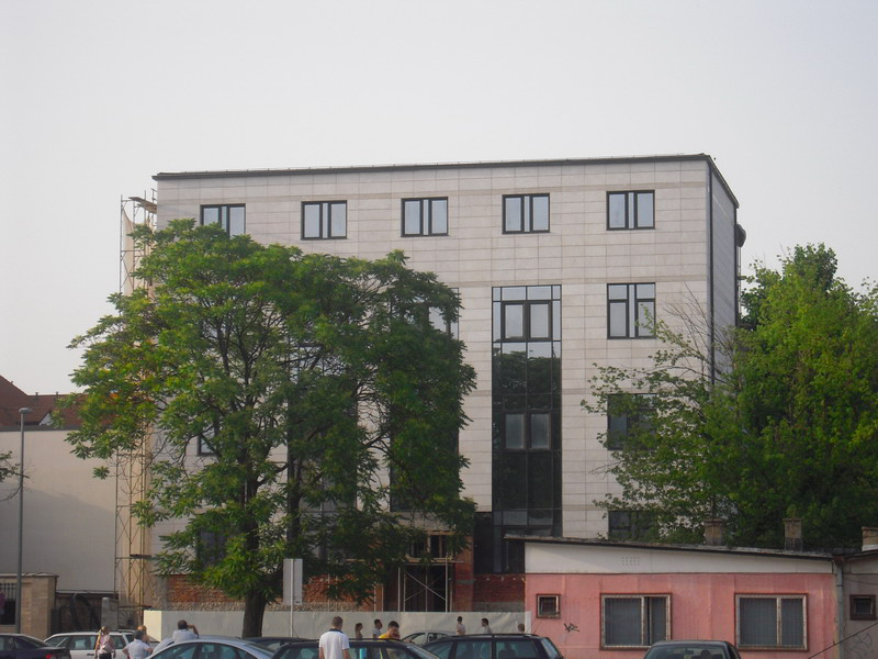 Академија наука и умјетности Републике Српске